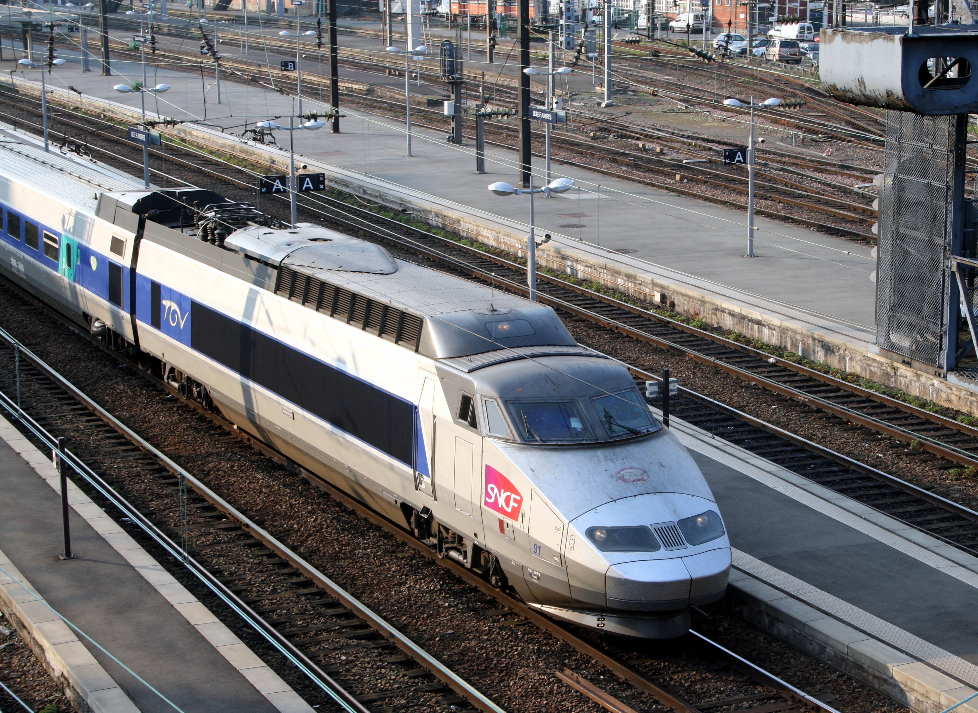 TGV dans la gare Flandre à Lille